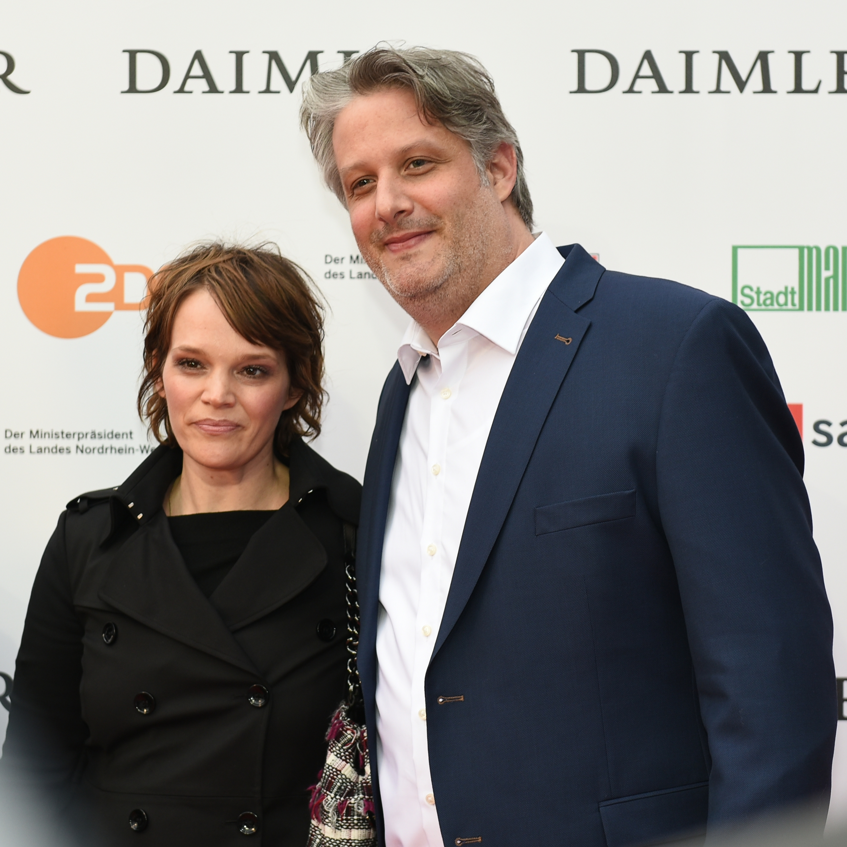 Verleihung des Grimme-Preises 2019.